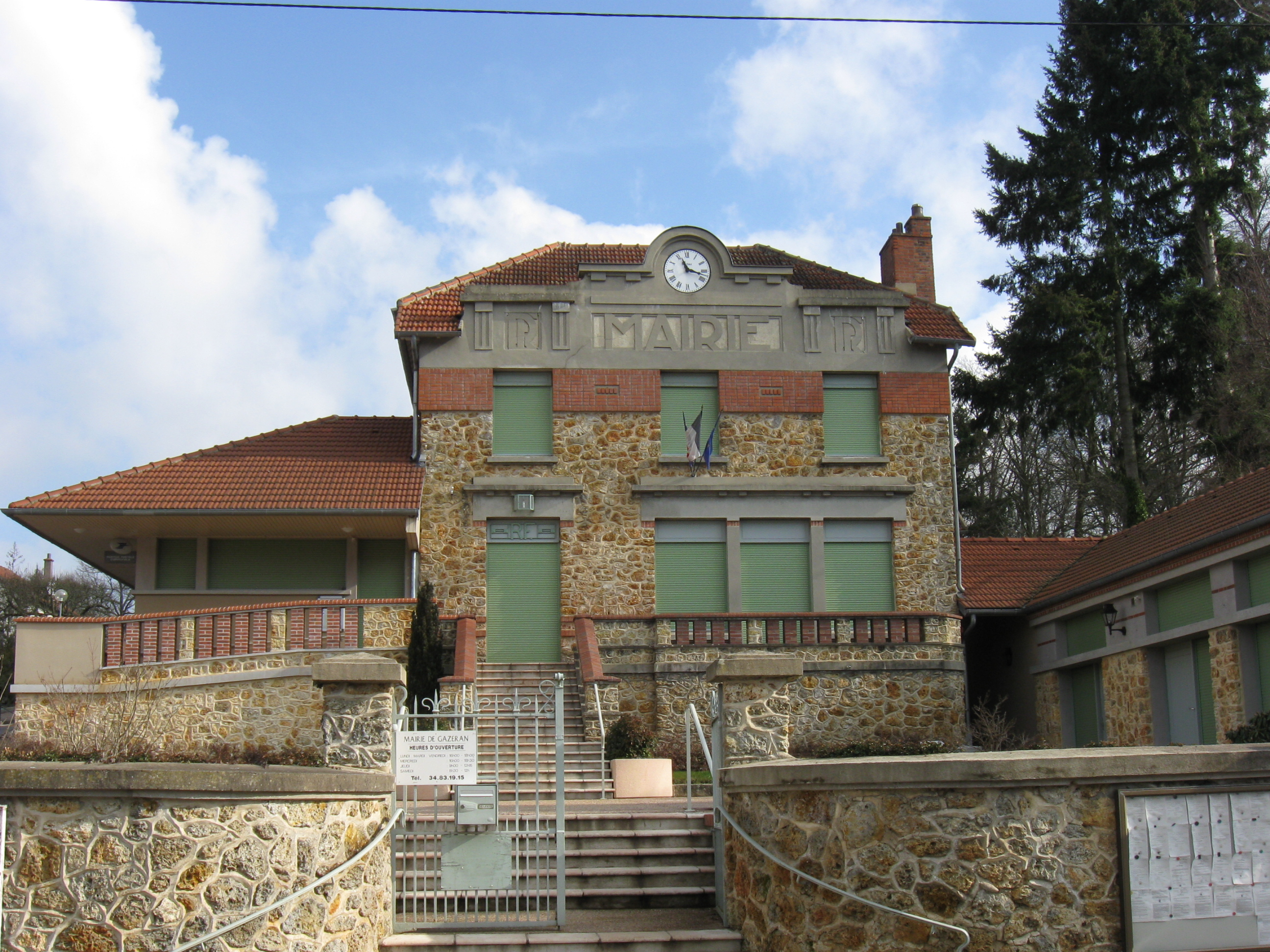 La mairie de Gazeran